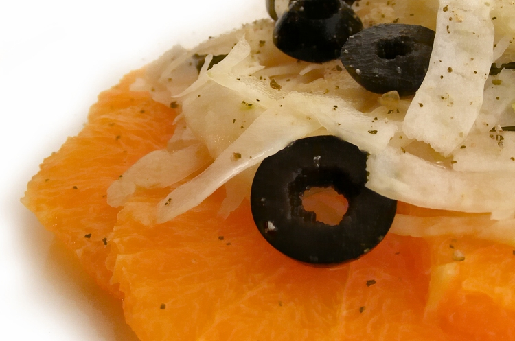 Sizilianischer Orangensalat mit Orangenscheiben, dünn geschnittenen Fenchelstreifen, schwarzen Oliven, Olivenöl und frisch gemahlenem schwarzem Pfeffer.